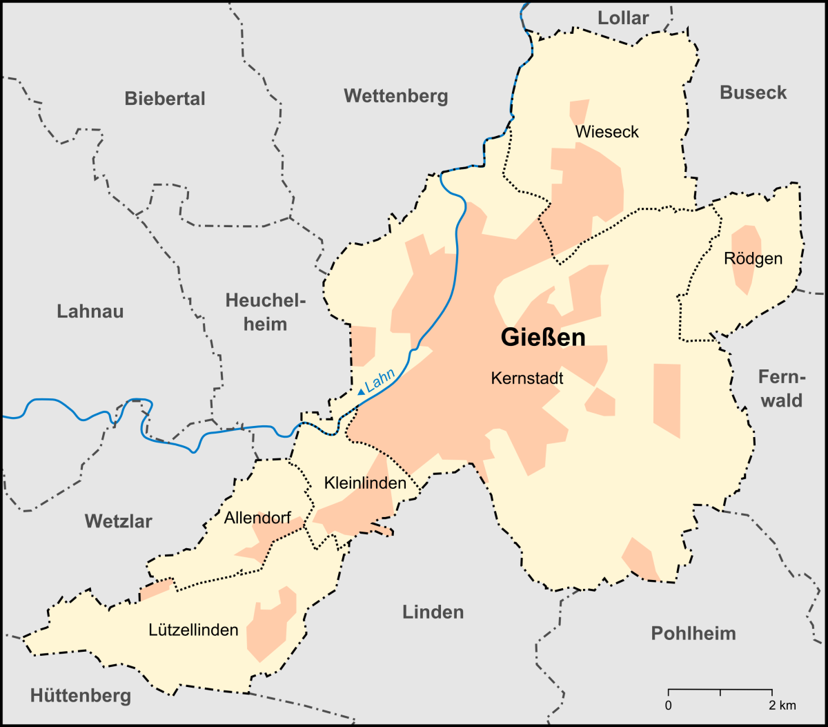 Karte der Ortsbezirke (laut Hauptsatzung) und der Umlandgemeinden von Gießen